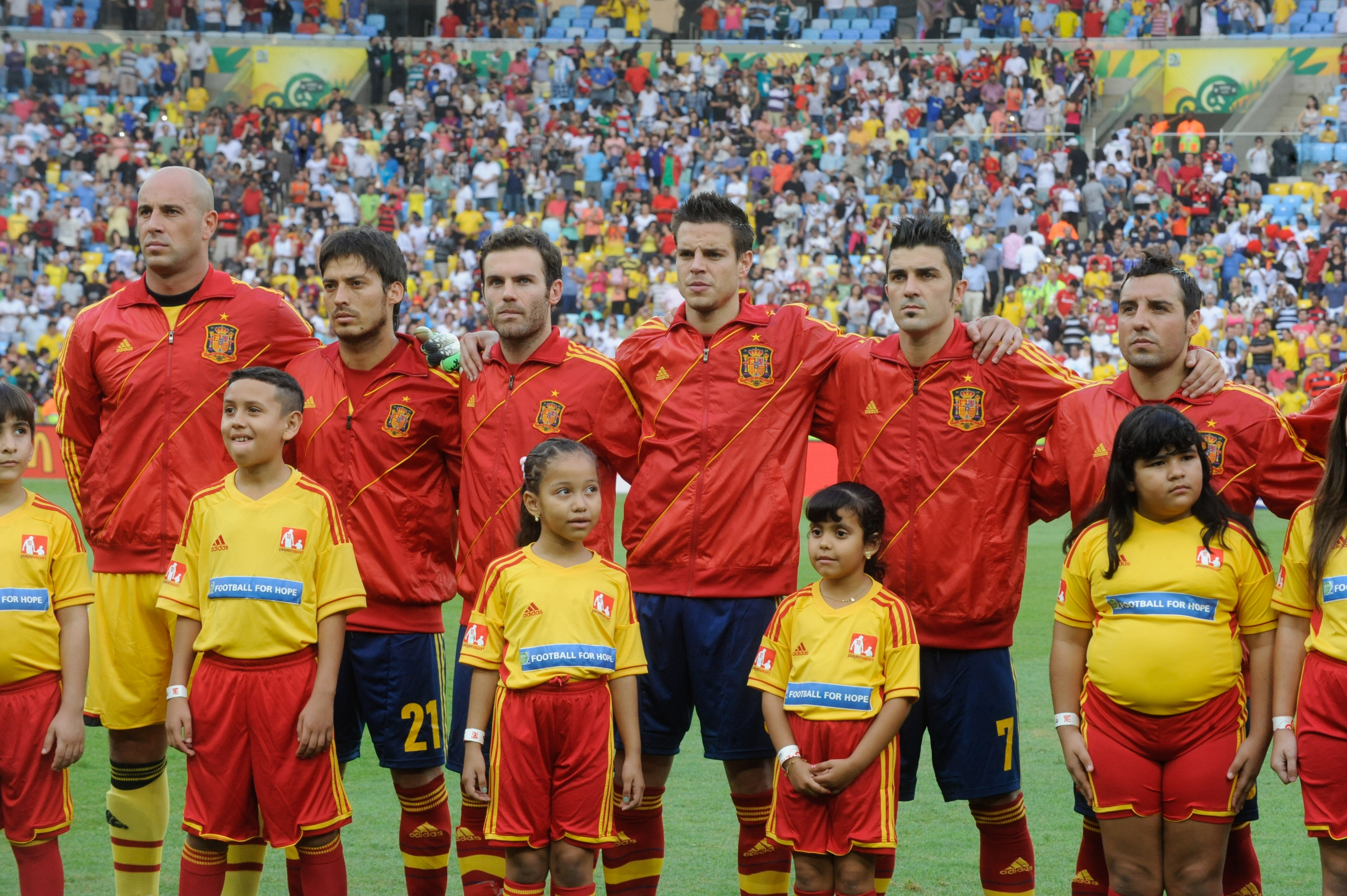 Espanha e Taiti se enfrentam na Copa das Confederações 2013